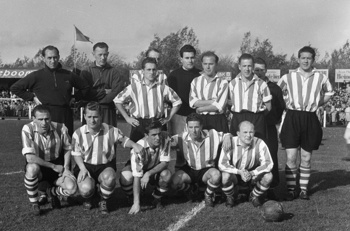 Sparta elftal.